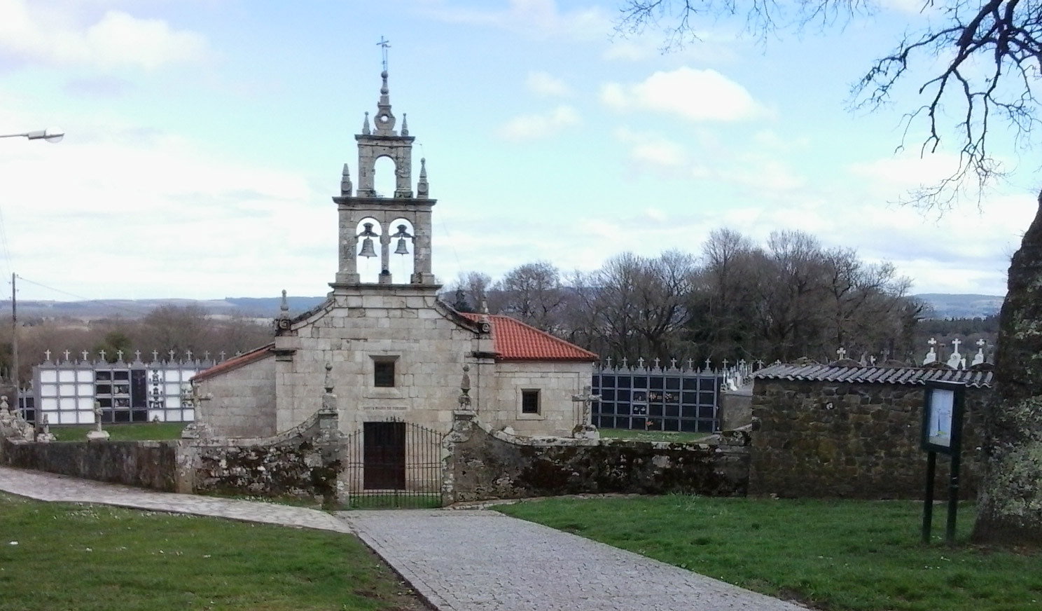 Vista da igrexa de Foxado no concello de Curtis A Coruña Galiza Spain